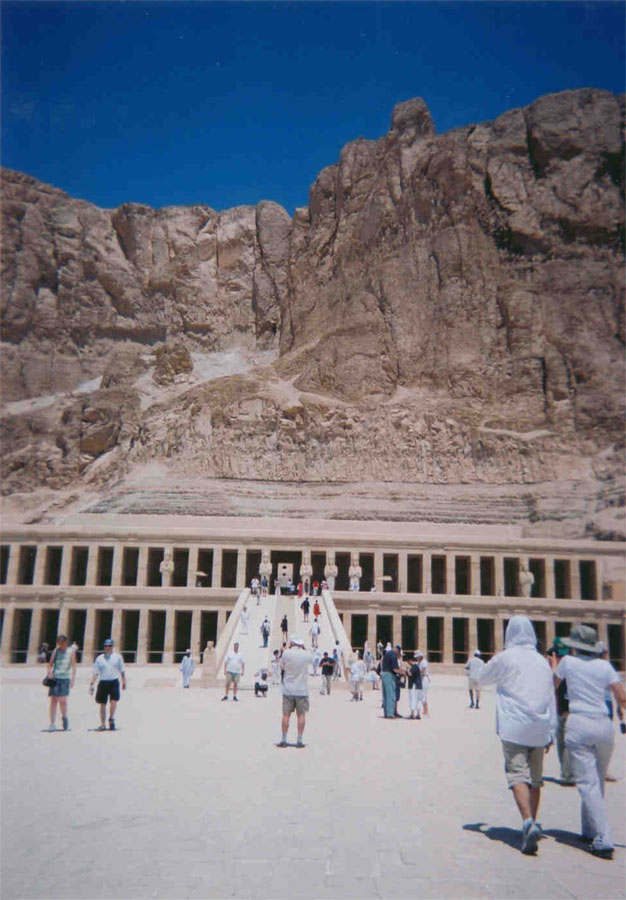 Acces al temple de Hatshepsut, imatge propia